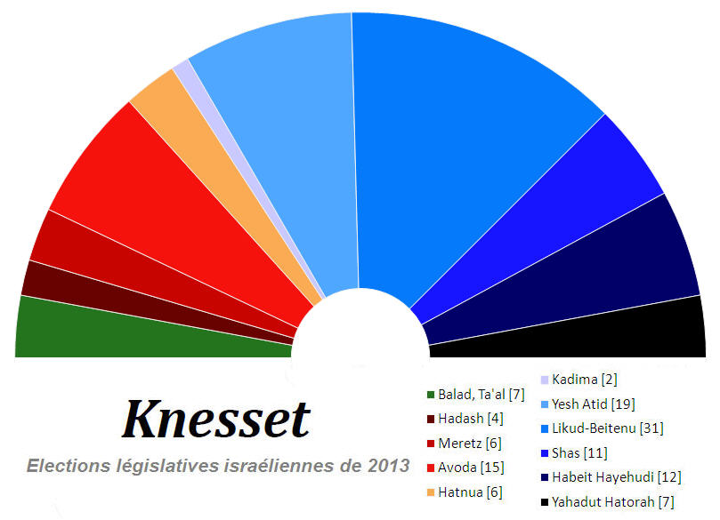 Composition de la Knesset après les élections législatives israéliennes du 22 janvier 2013.